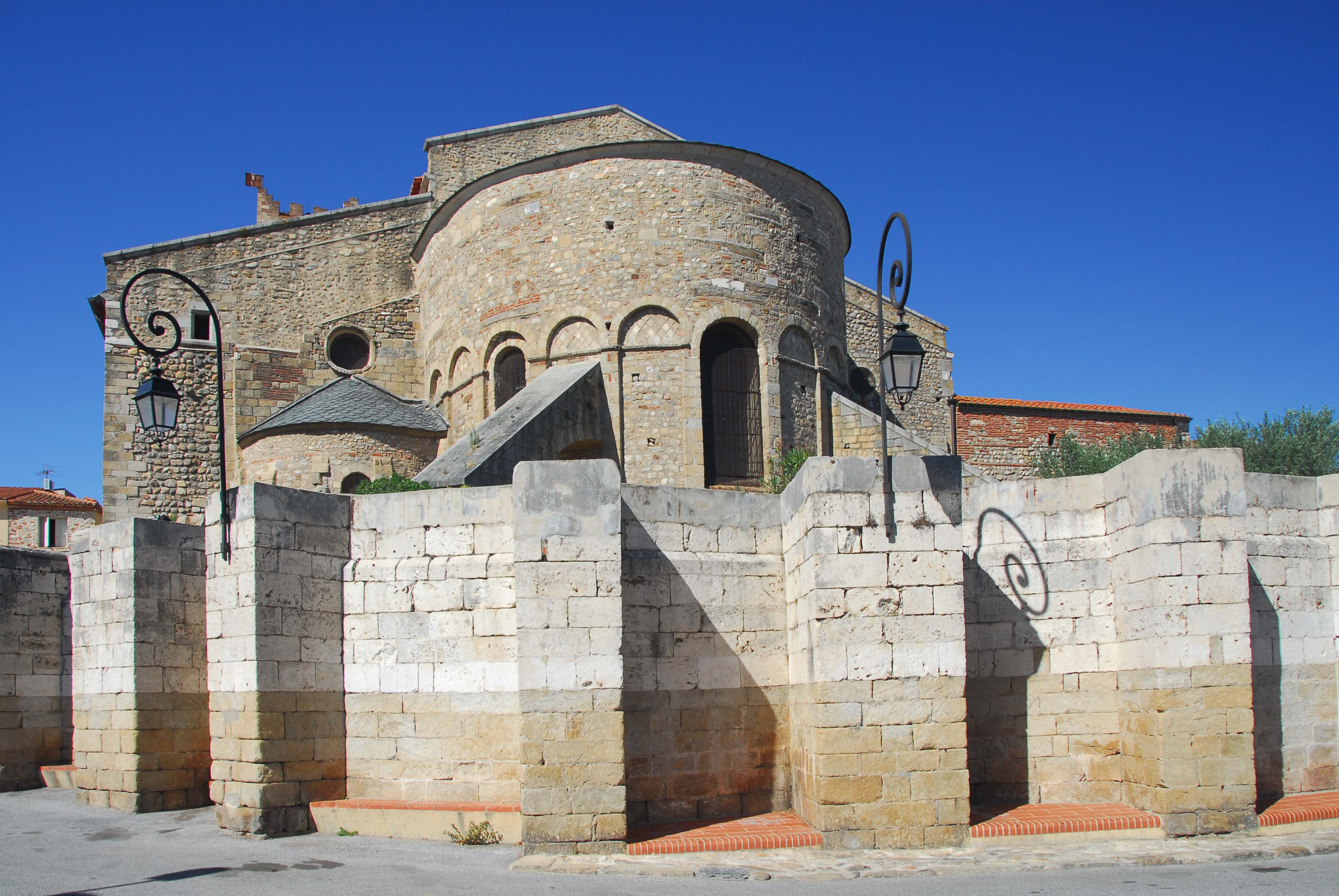 Ste-Eulalie-et-Ste-Julie_d’Elne, Chorhaupt von O